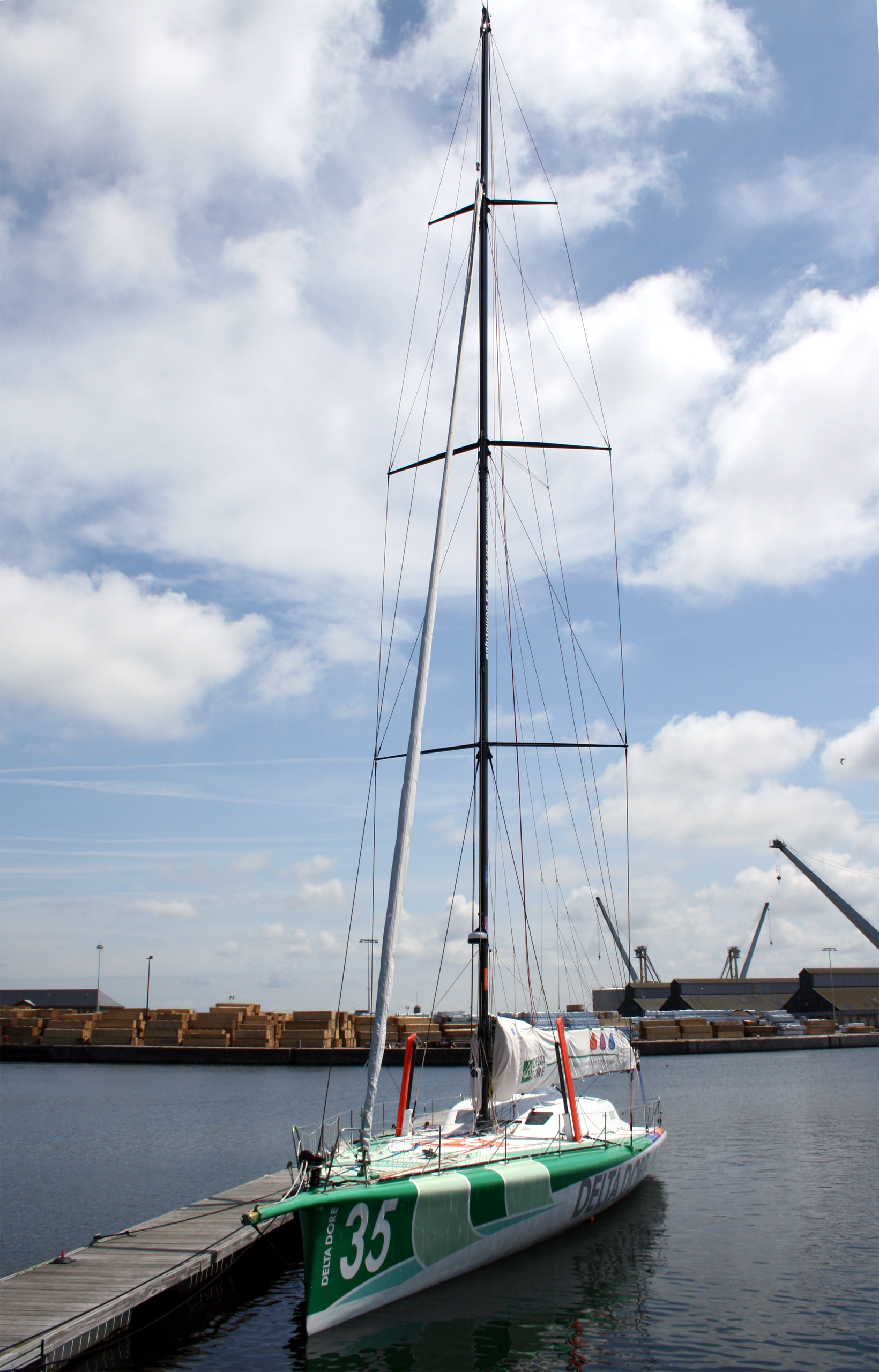 Delta Dore dans le port de Saint-Malo.